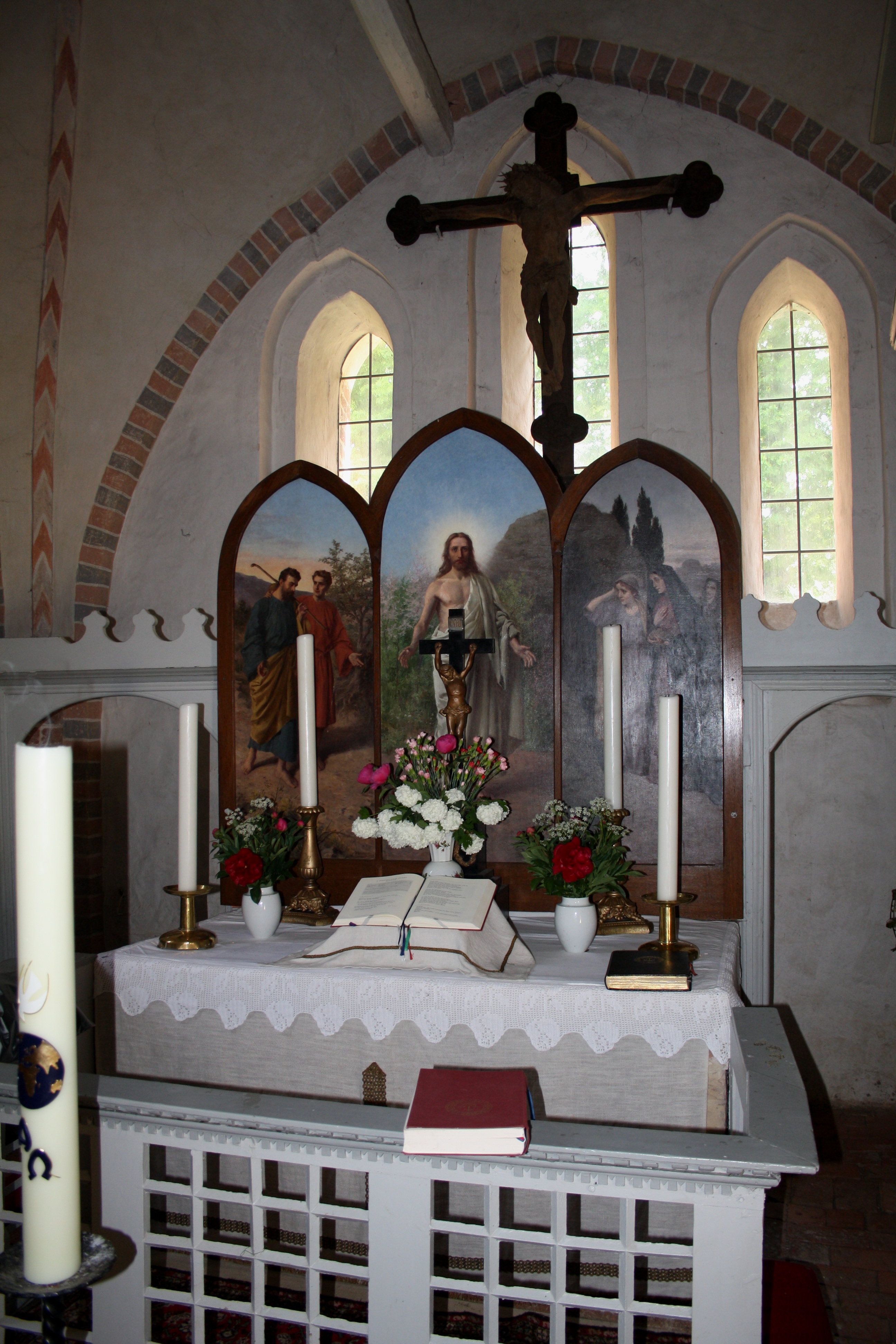 Altar